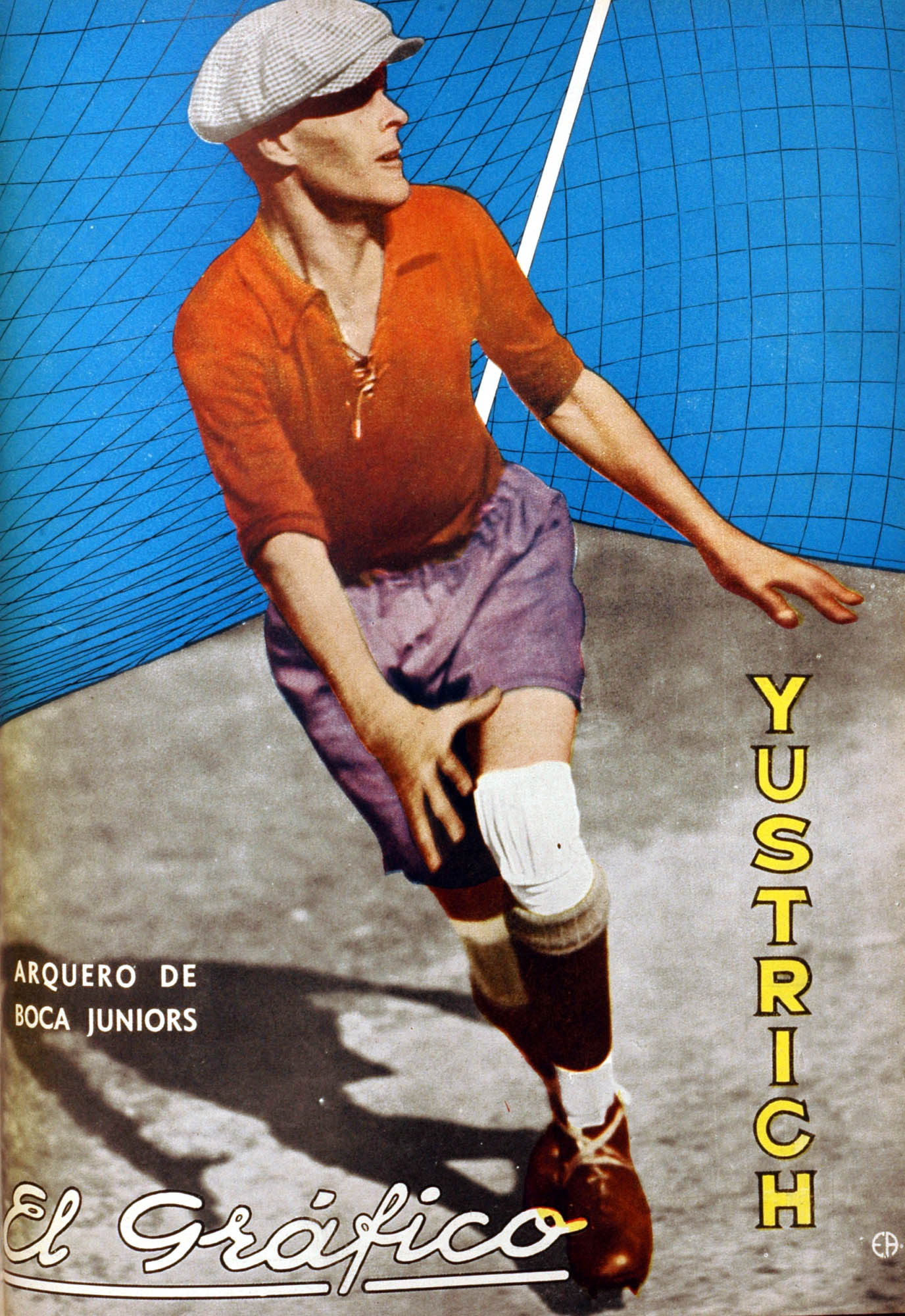 El Grafico del 30 de Abril de 1932. Edicion 668